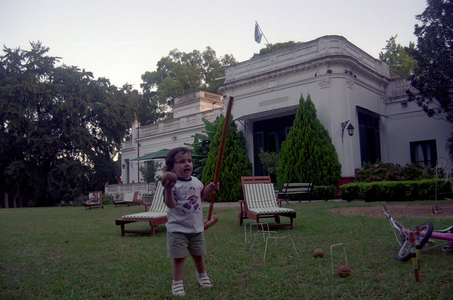 Niña jugando croquet en la Estancia La Oriental, en Junín, Argentina.